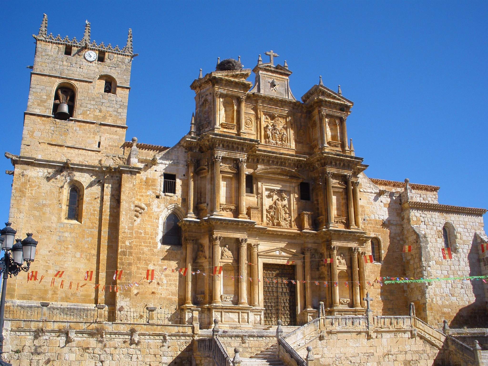 Gumiel de Izán - Iglesia de Santa María de la Asunción